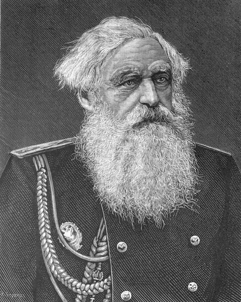 Филипсон Григорий Иванович, русский генерал от инфантерии, сенатор